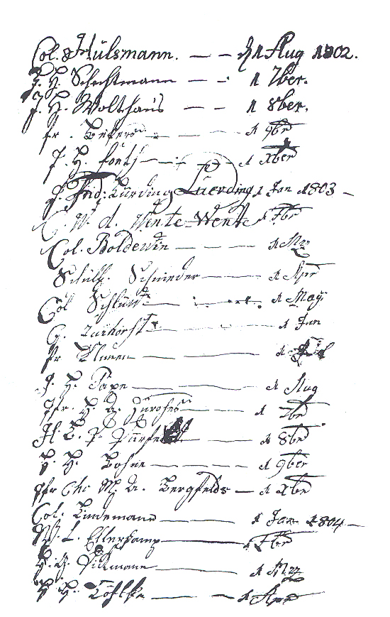 Scan eines Fotos einer Umlaufliste von 1802-1805 der Menslager Lesegesellschaft